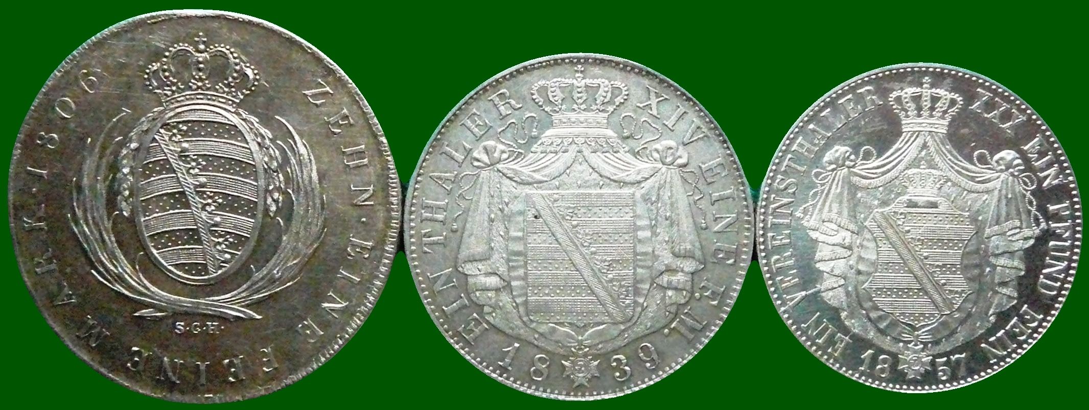 Taler im Königreich Sachsen Größenvergleich: Konventionstaler im 10-Taler-Münzfuß 1806-1838 Taler Kurant im 14-Taler-Münzfuß 1839-1856 Vereinstaler im 30-Taler-Münzfuß 1857-1871